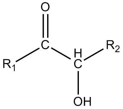 酮醇